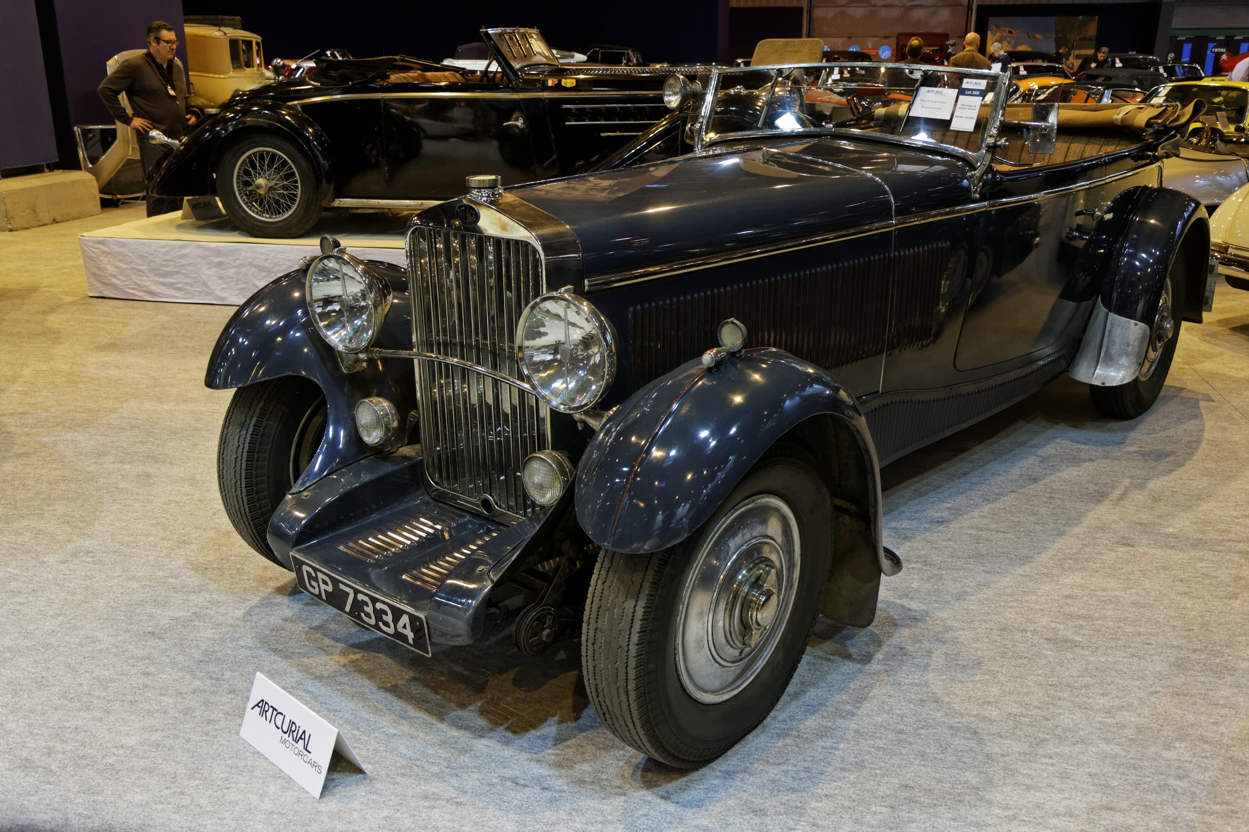 Une Delage D8 Roadster Chapron berline exposée lors du salon Retromobile 2014